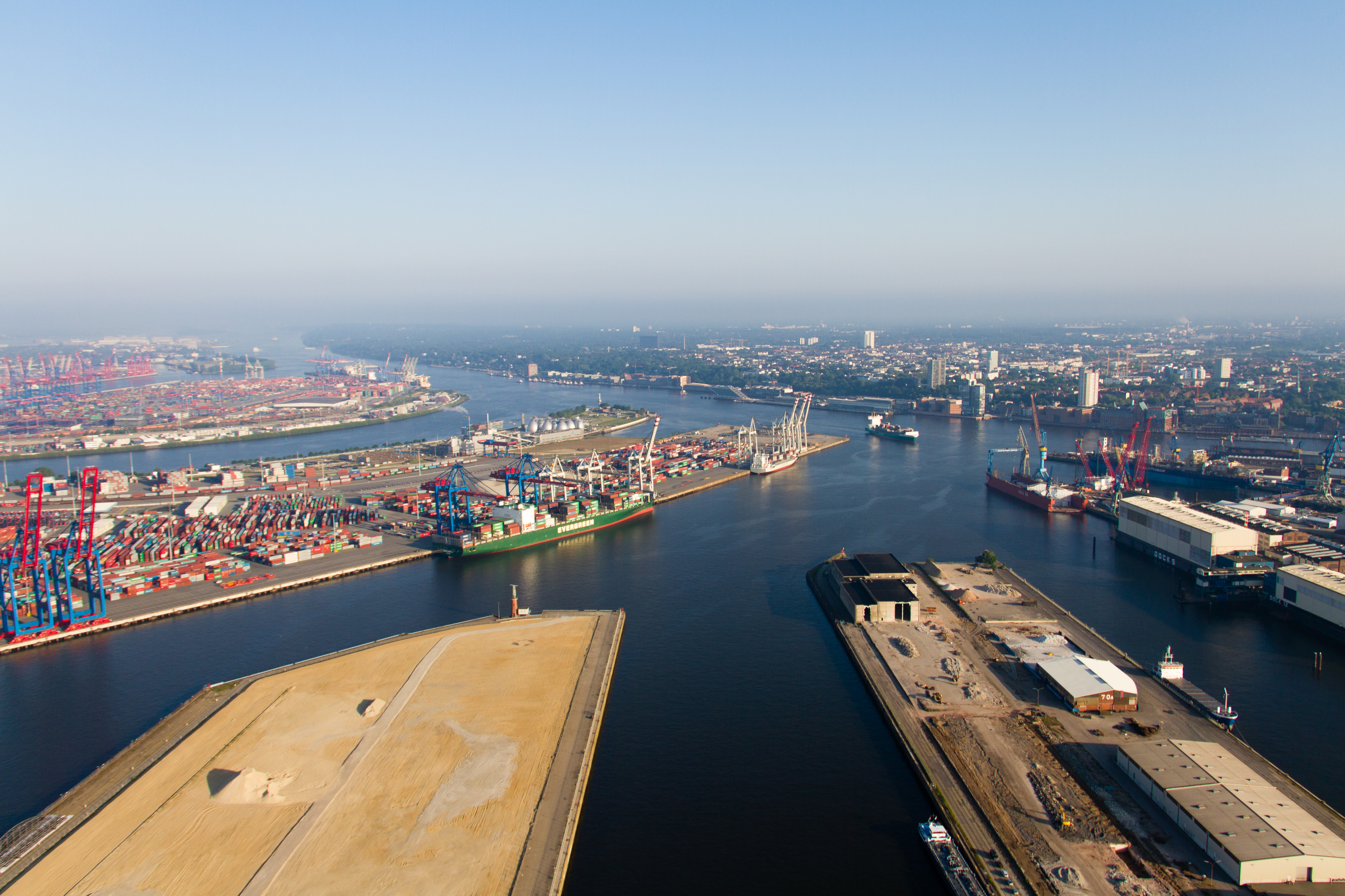 Aufnahme während des Projekts Heißluftballon